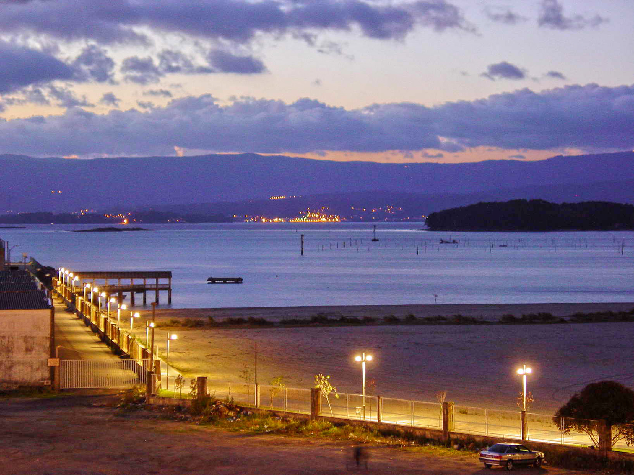 Vilagarcía - Pontevedra - Galicia - Spain